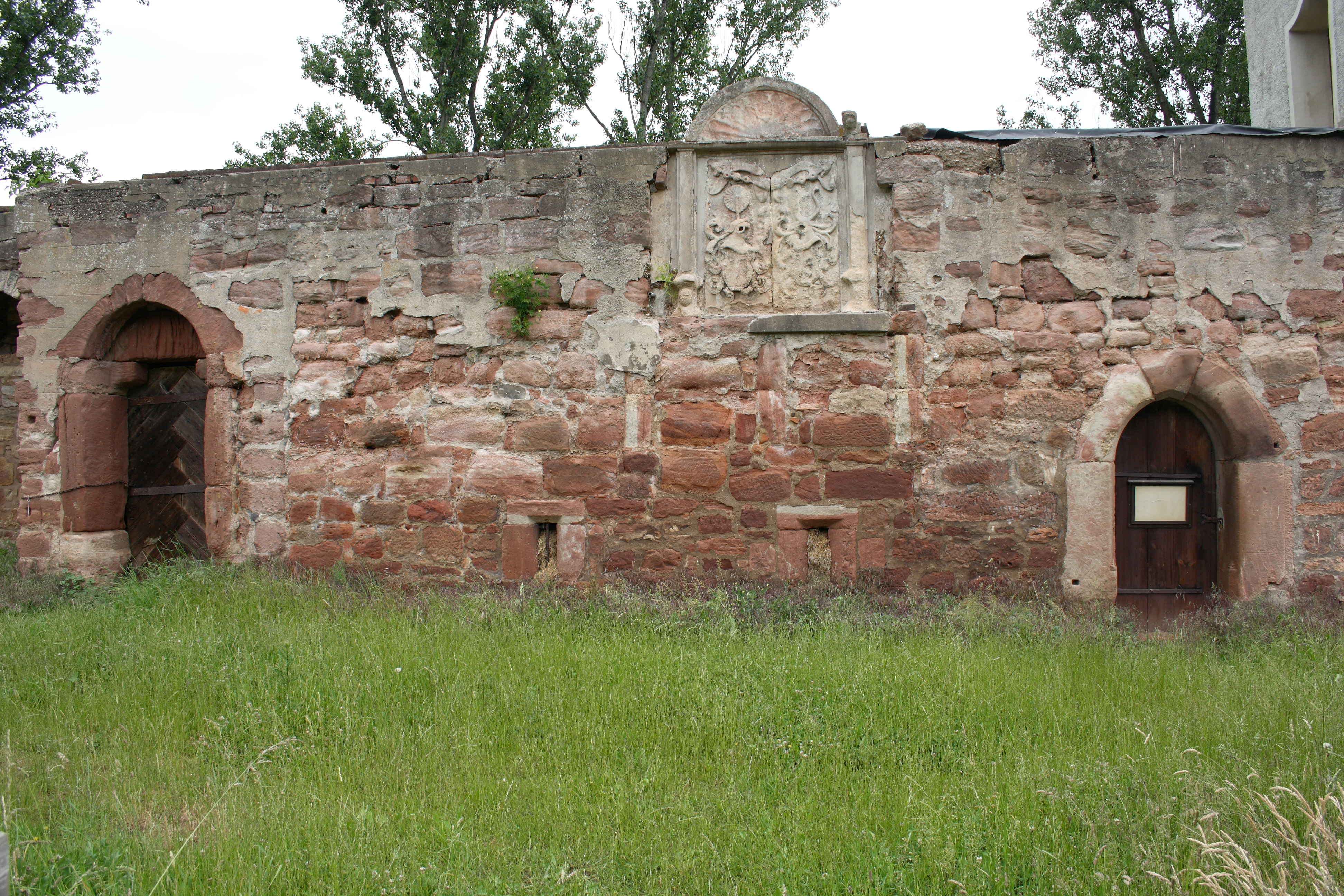 Wasserburg Aue in Aue, einem Ortsteil von Wanfried im Werra-Meißner-Kreis (Hessen), Stammsitz der Herren von Aue, nach 1435 im Besitz der Herren von Eschwege